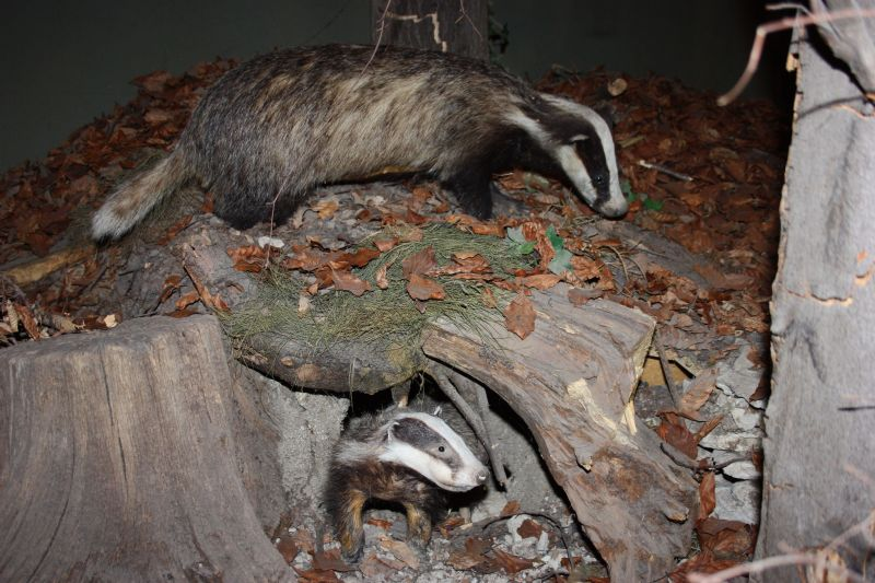 Dachspräperate vor Dachsbau in der Daueraustellung Wald im Museum am Schölerberg Osnabrück.